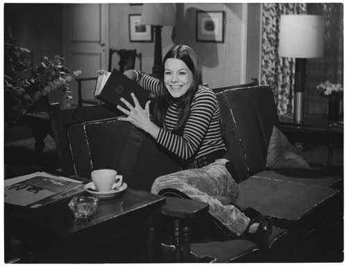 Fotografía blanco y negro, sobre papel fotográfico brillante. Escena en un interior, con la actriz Cristina Lemercier. Esta, se halla sentada con las piernas recogidas, sobre el asiento de un sillón, sonriendo y con un libro entre las manos.